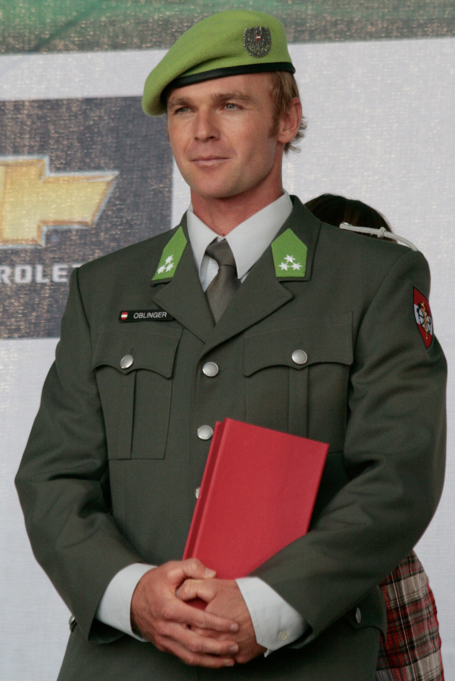 Helmut Oblinger am Tag des Sports 2009 auf dem Heldenplatz in Wien